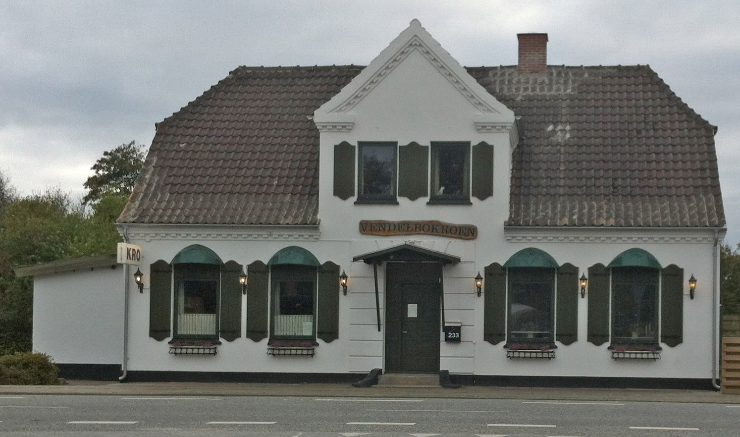 Vendelbokroen i Thorshøj